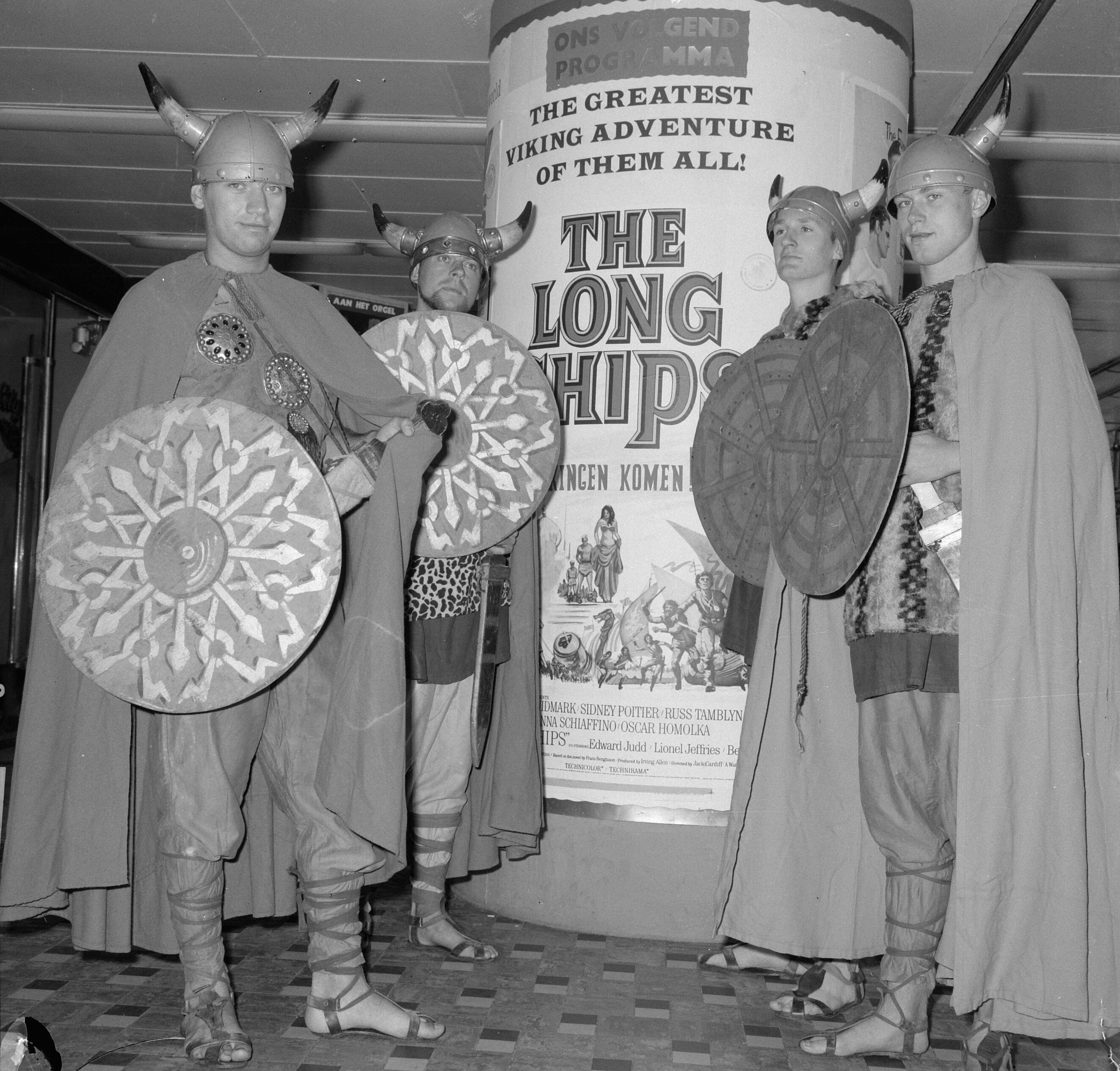 Collectie / Archief : Fotocollectie Anefo Reportage / Serie : [ onbekend ] Beschrijving : Filmreclame. De mars van de Vikingen over het Gartmanplantsoen te Amsterdam [Opdracht Columbiafilm n.a.v. uitgebrachte film "The Long Ships"] Datum : 14 september 1964 Locatie : Amsterdam, Noord-Holland Trefwoorden : films, reclame, vikingen Instellingsnaam : Columbia Film Fotograaf : Nijs, Jac. de / Anefo Auteursrechthebbende : Nationaal Archief Materiaalsoort : Negatief (zwart/wit) Nummer archiefinventaris : bekijk toegang 2.24.01.03 Bestanddeelnummer : 916-8776